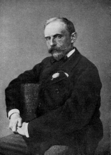 Кирилл (Карл) Викентьевич Лемох (1841–1910). Фотография.